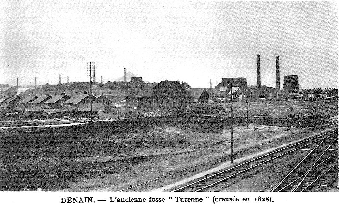 Ancienne fosse de la compagnie d'Anzin arrêtée en 1887